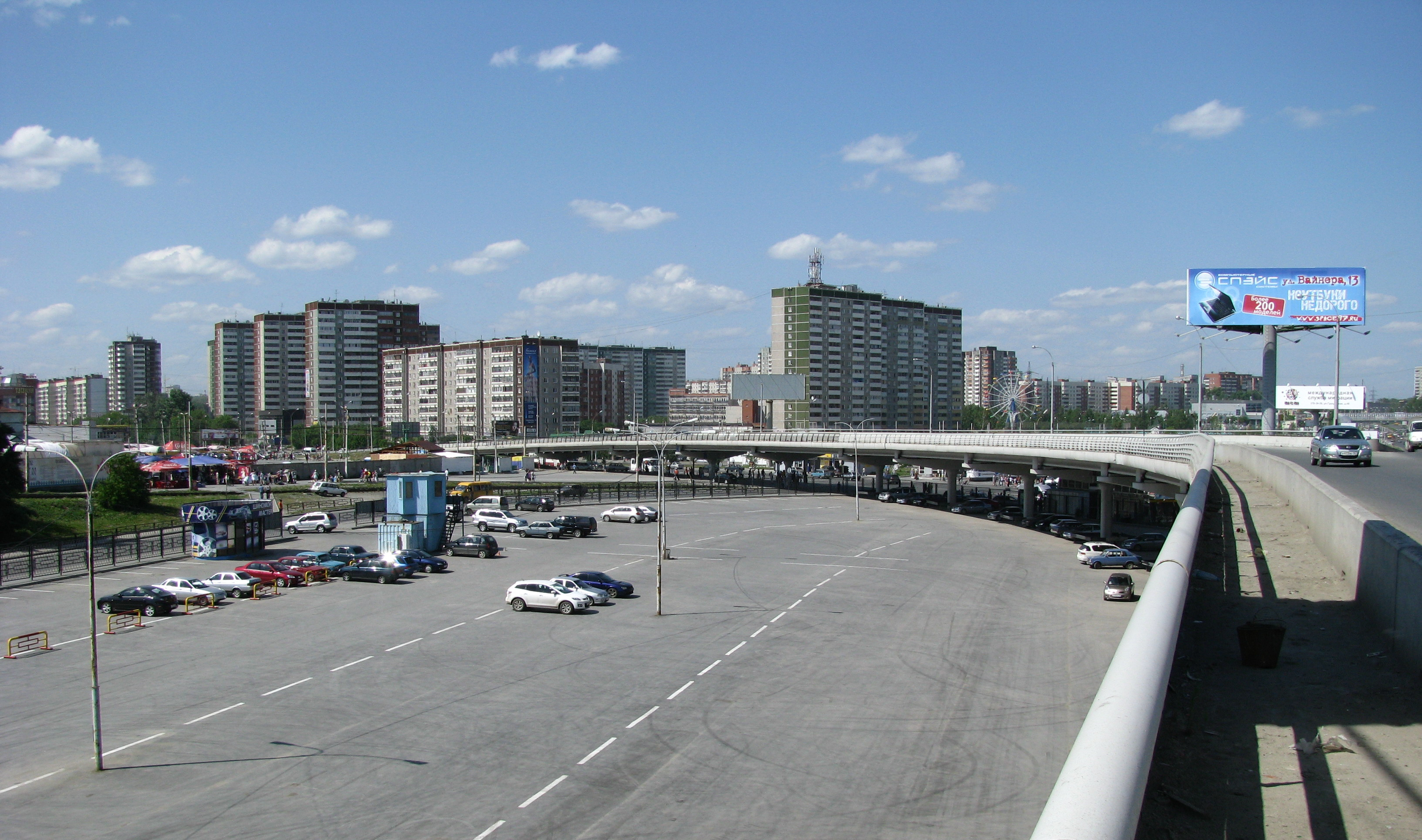 Район рынка «Таганский ряд» в Екатеринбурге.